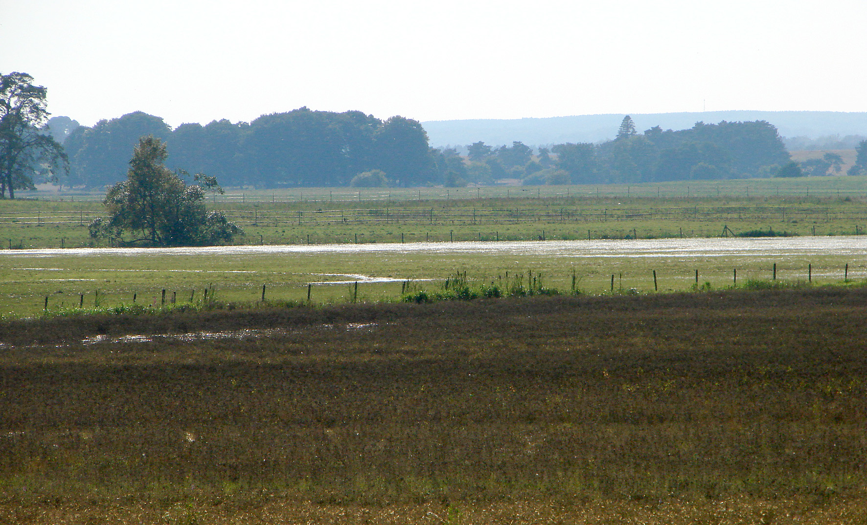 sv/da: Vombsjön enge ved naturreservatet Klingavälsån (Klingavallsån, Klingvallsån, Klingaå) är ett vattendrag i södra delen av Skåne, biflöde till Kävlingeån.